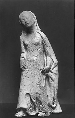 Mädchenplastik, Gretel Schulte-Hostedde um 1944